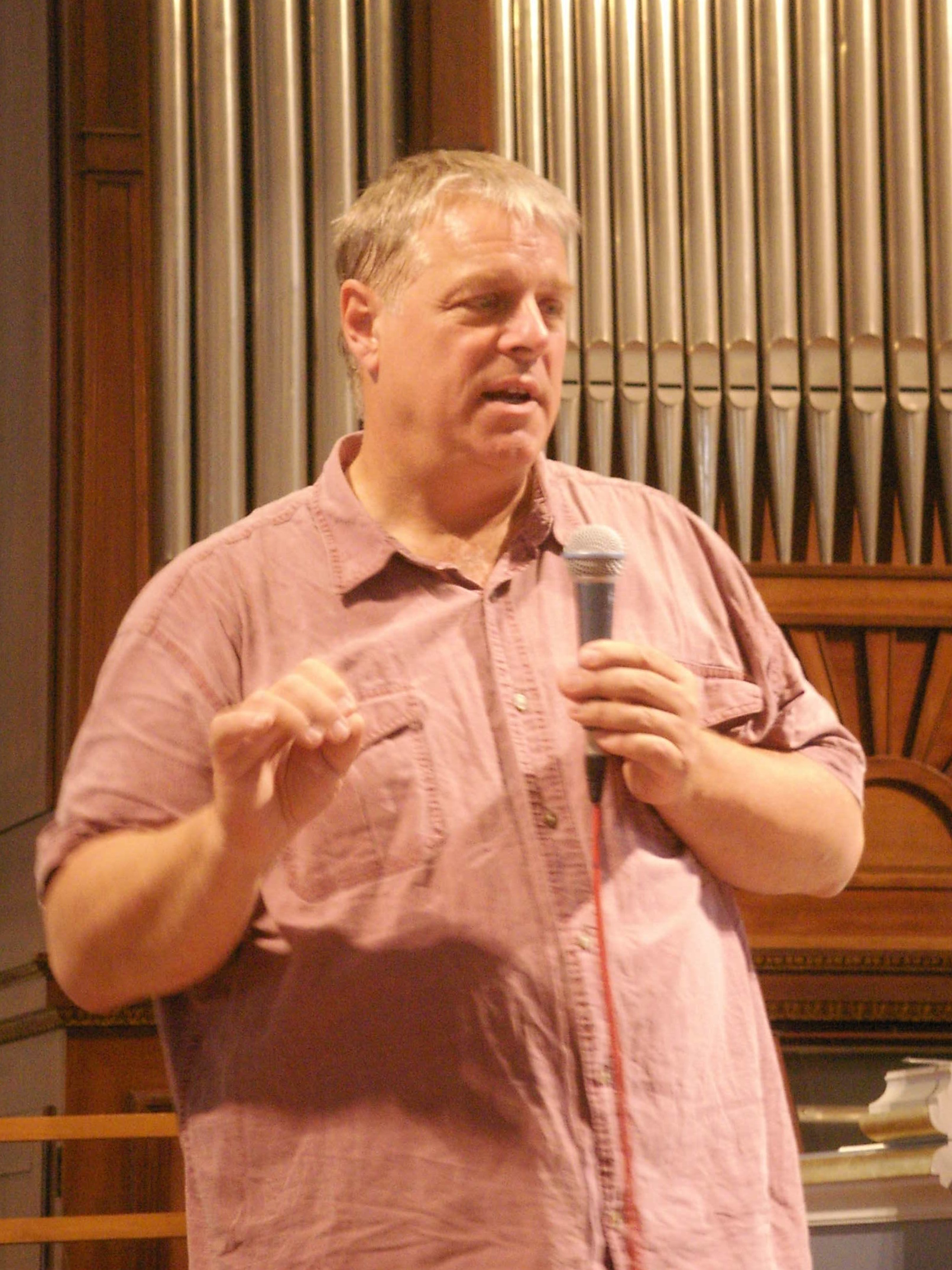 Der Orgelbauer Kristian Wegscheider, bei der Vorstellung seines im Auftrag der Bachakademie Stuttgart (Initiative Hans-Christoph Rademann) erstellten Nachbaues einer in Seerhausen aufgefundenen Truhenorgel aus der Werkstatt von Gottfried Silbermann. Am 7. September 2016 im Haus der Musik (Stuttgart).